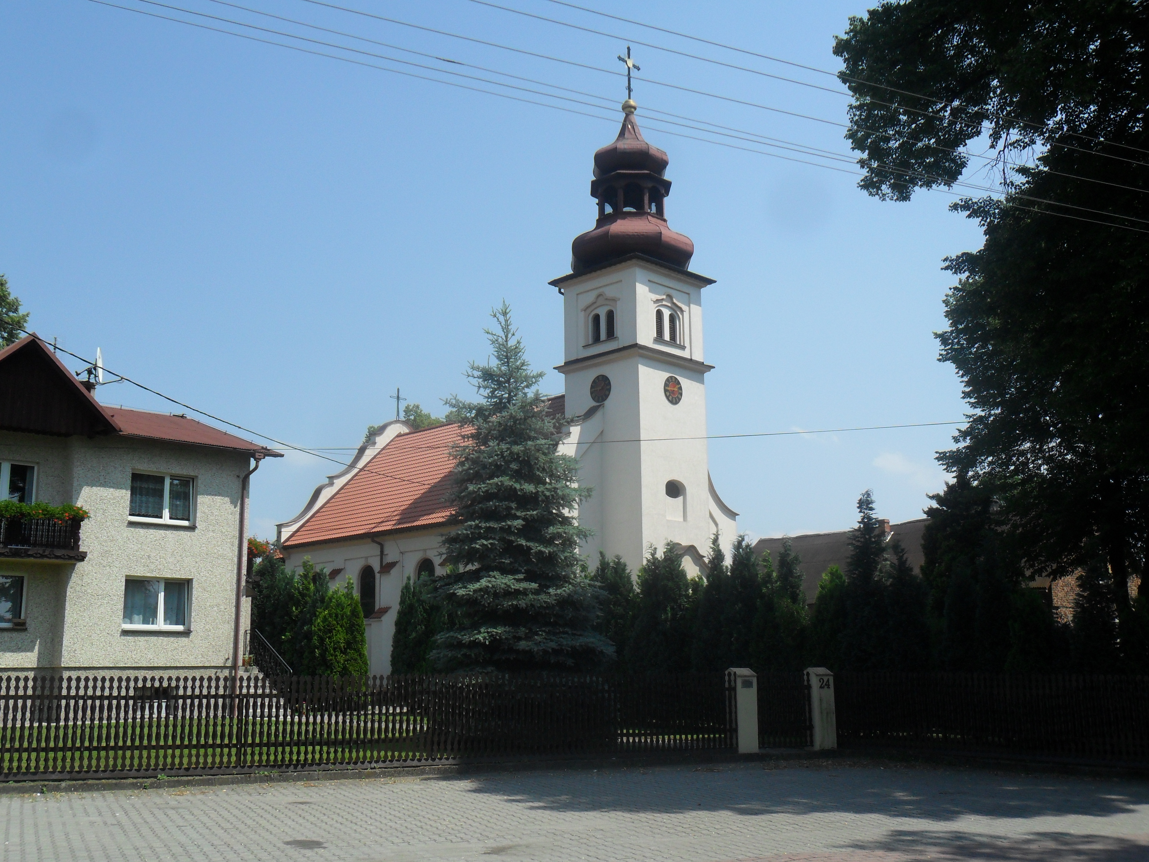 Kościół pw. Matki Boskiej Nieustającej Pomocy w Bukowie